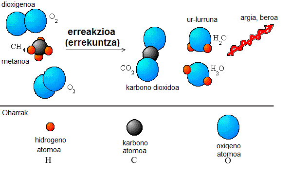 Errekuntza erreakzio bat irudikatzen duen irudia. Erreaktiboak metanoa eta oxigenoa dira.